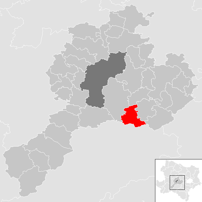 Bezirk St. Pölten-Land